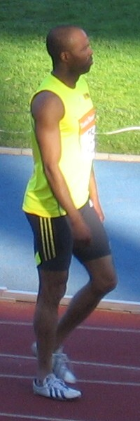 Nnamdi Anusim Paavo Nurmen kisoissa, Paavo Nurmen stadionilla, Turussa, 24. kesäkuuta 2009